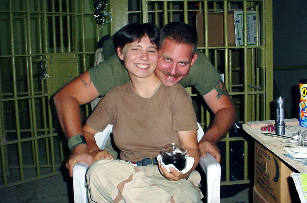 Sur la chaise Lynndie England, et derrière, son époux, Charles Graner, dans la prison d'Abou Ghraib.